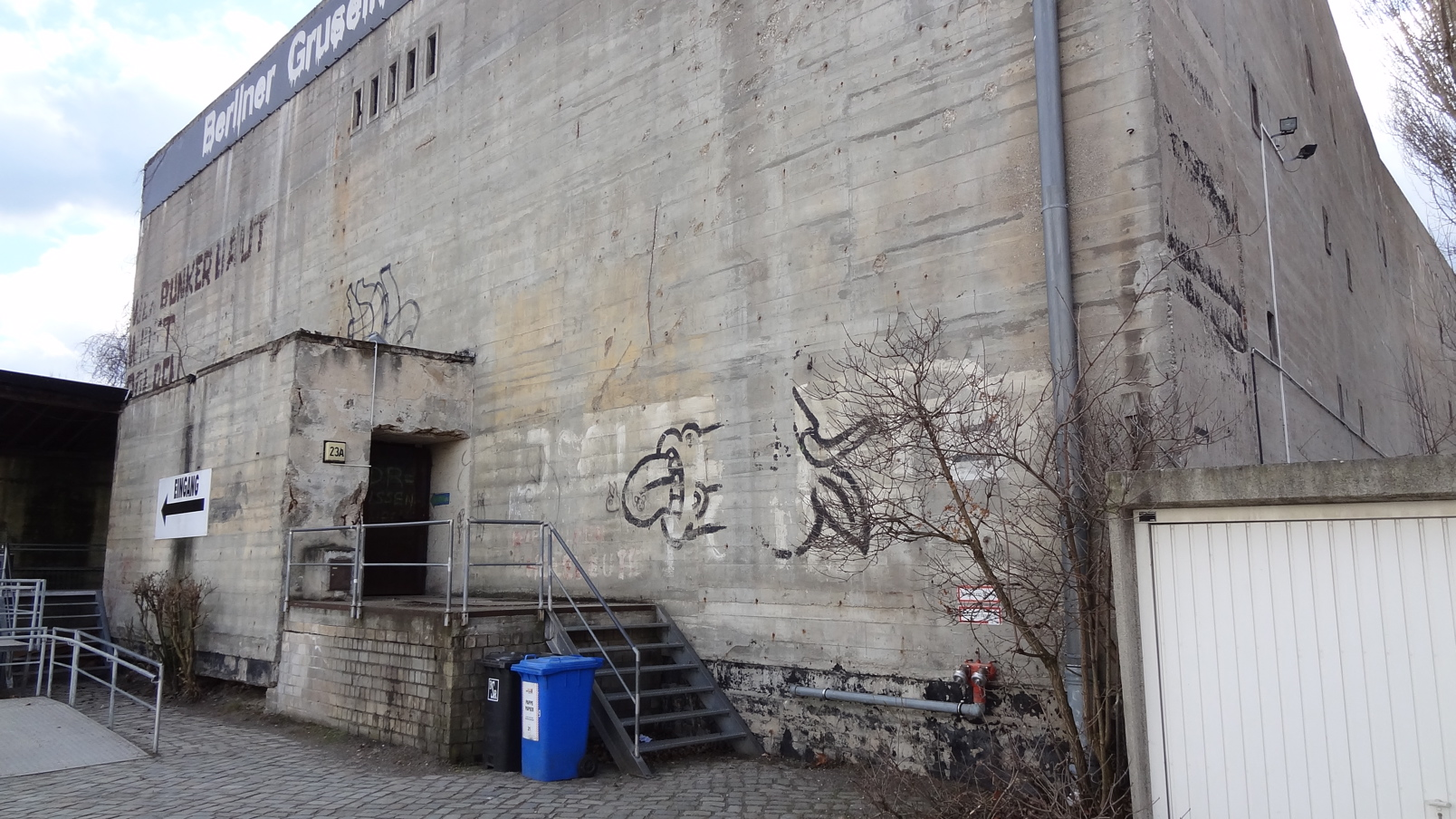 Deitsch: Hochbunker Anhalter Bahnhof in Berlin